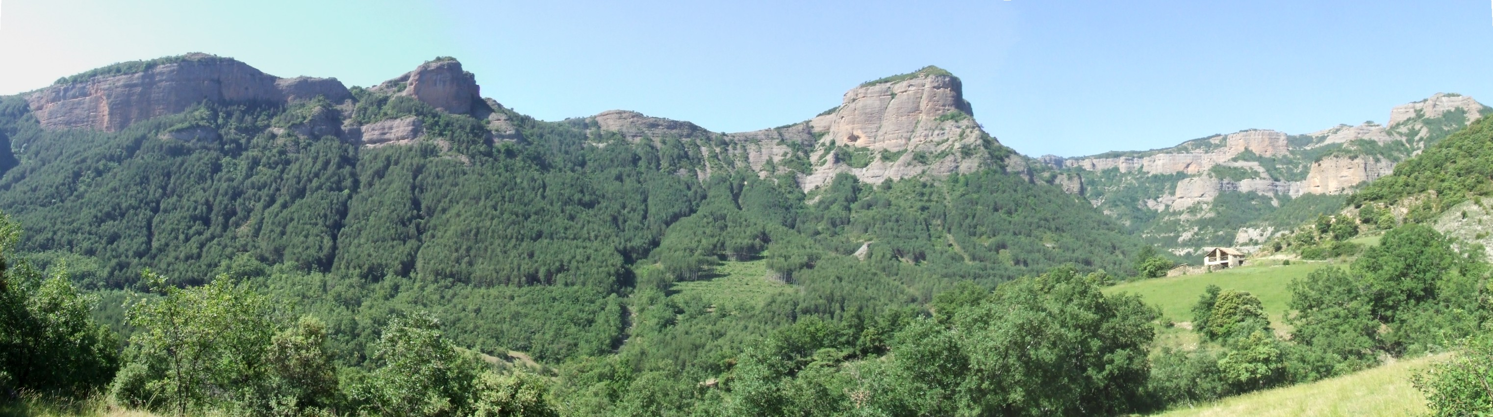 Serra de Sant Salvador i Roca Palomera (Serradell, Toralla i Serradell, Conca de Dalt, Pallars Jussà)